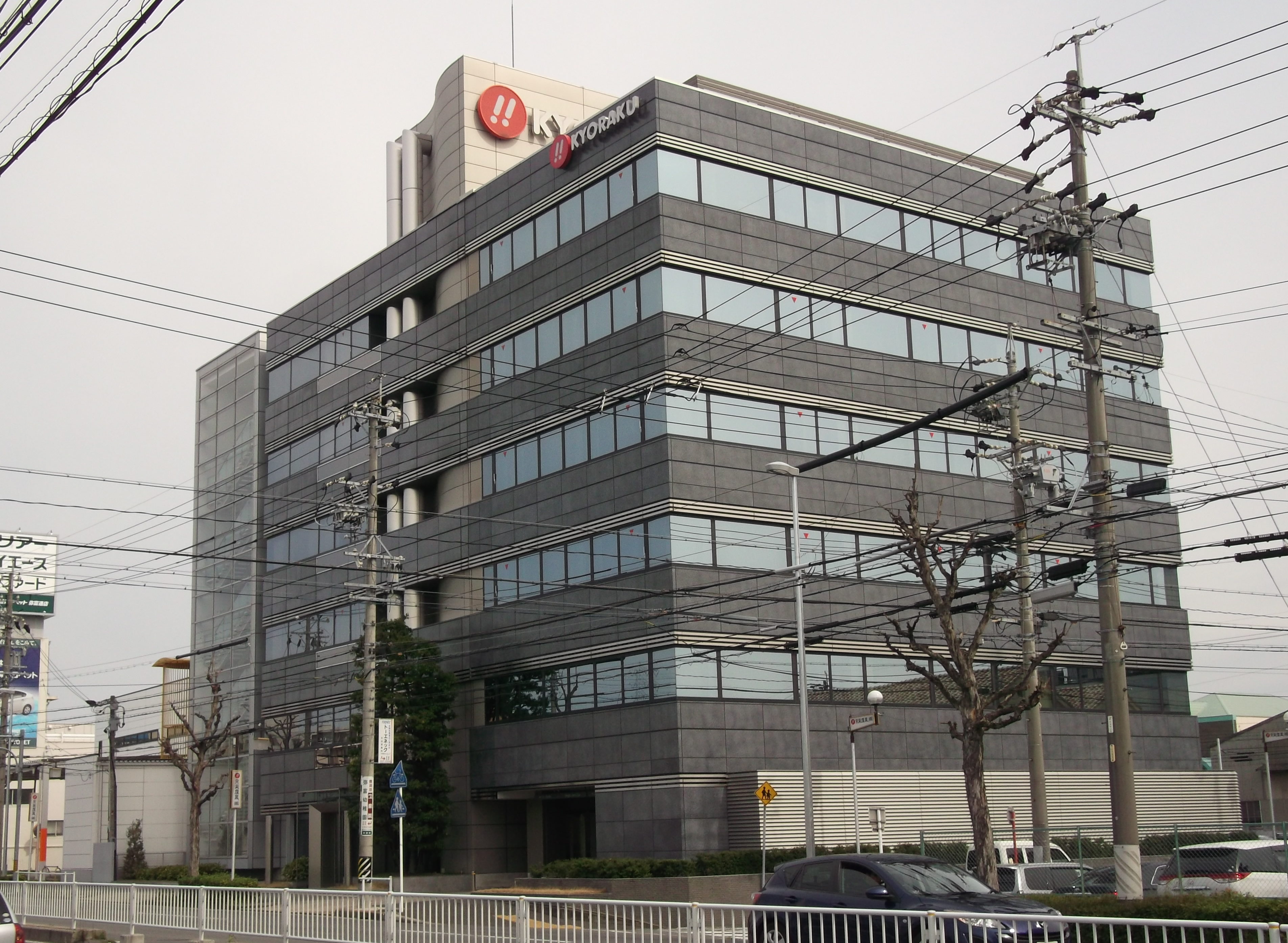 名古屋市天白区中砂町の京楽産業.本社を北側公道西側より撮影。トリミング処理済。